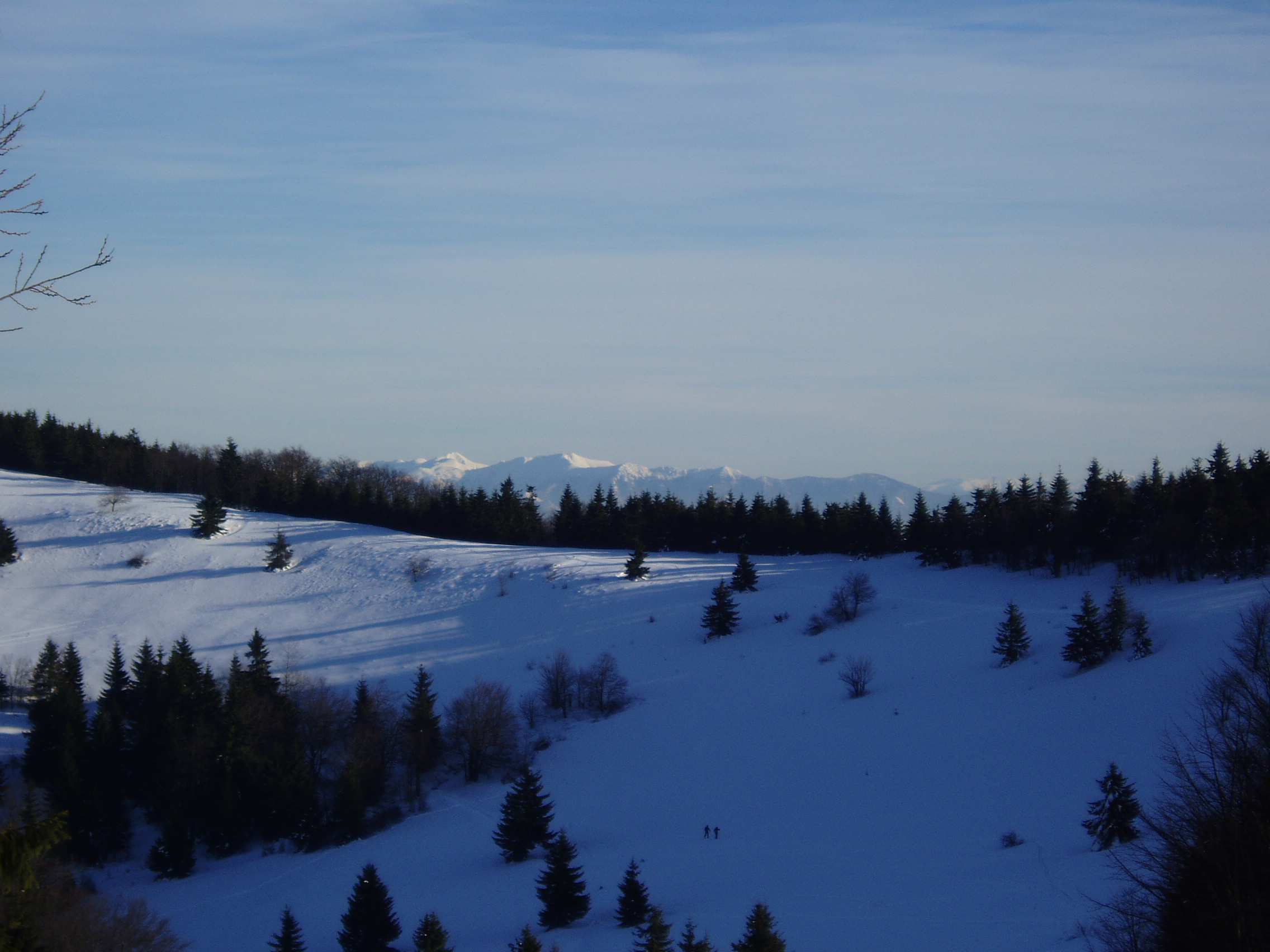 Pohled na hÅ™eben VelkÃ©ho JavornÃ­ku a v pozadÃ­ slovenskÃ© Kysuce Fotograf: TomÃ¡Å¡ KolaÅ™Ã­k